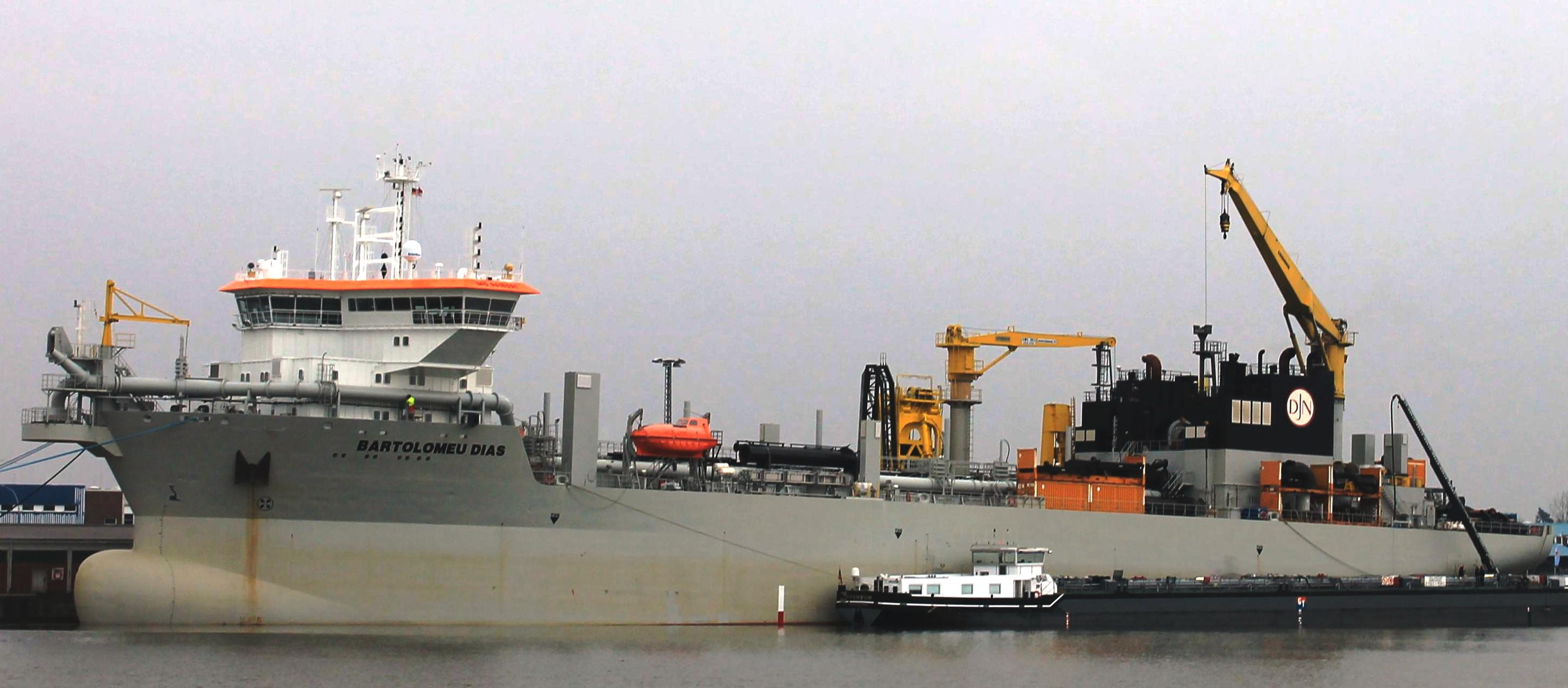 Batolomäus Diaz in Bremerhaven